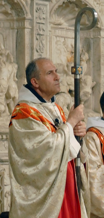 L'abat Josep Alegre en una celebració al monestir de Poblet.